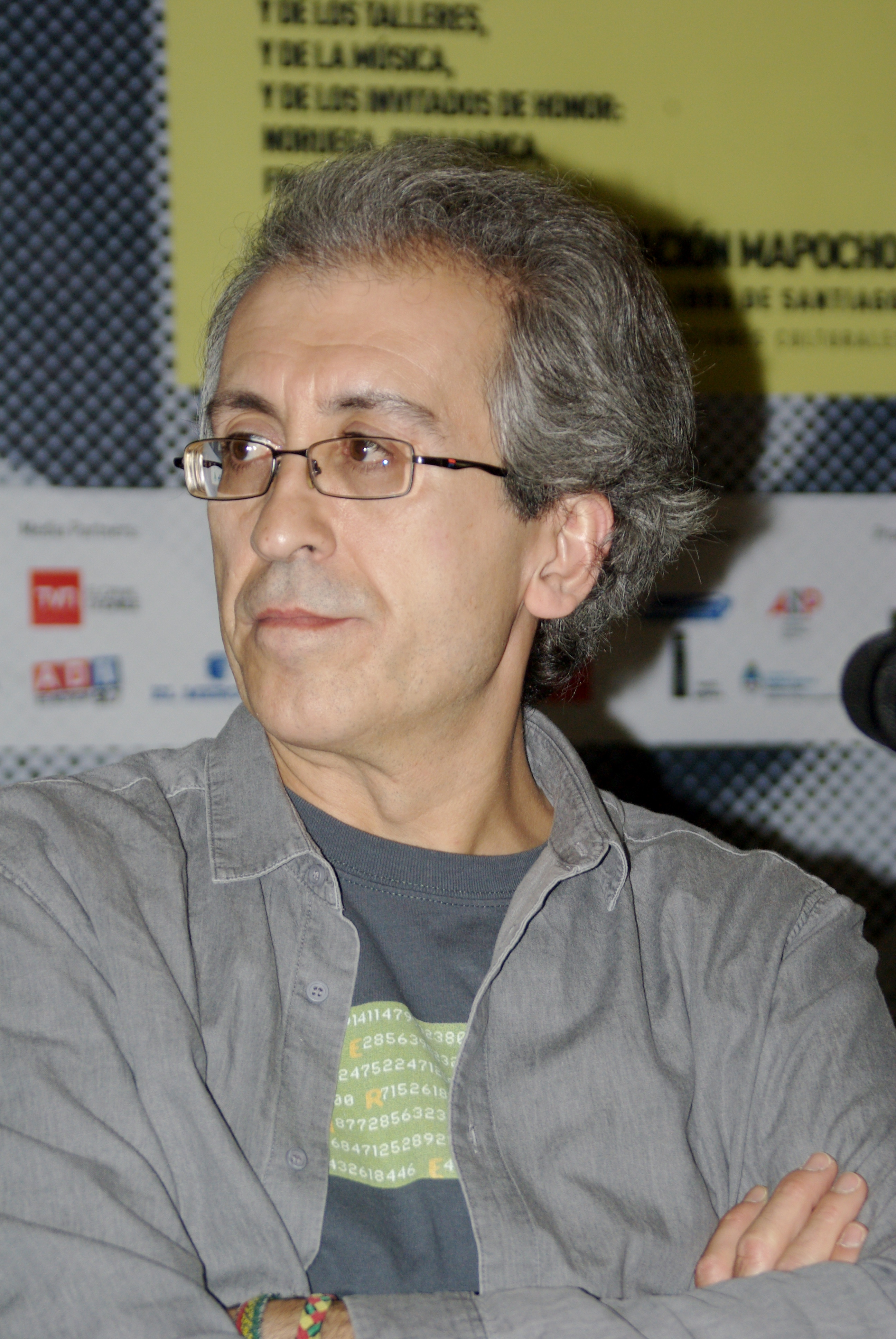 El escritor y crítico literario español David Roas en la Feria Internacional del Libro de Santiago 2015